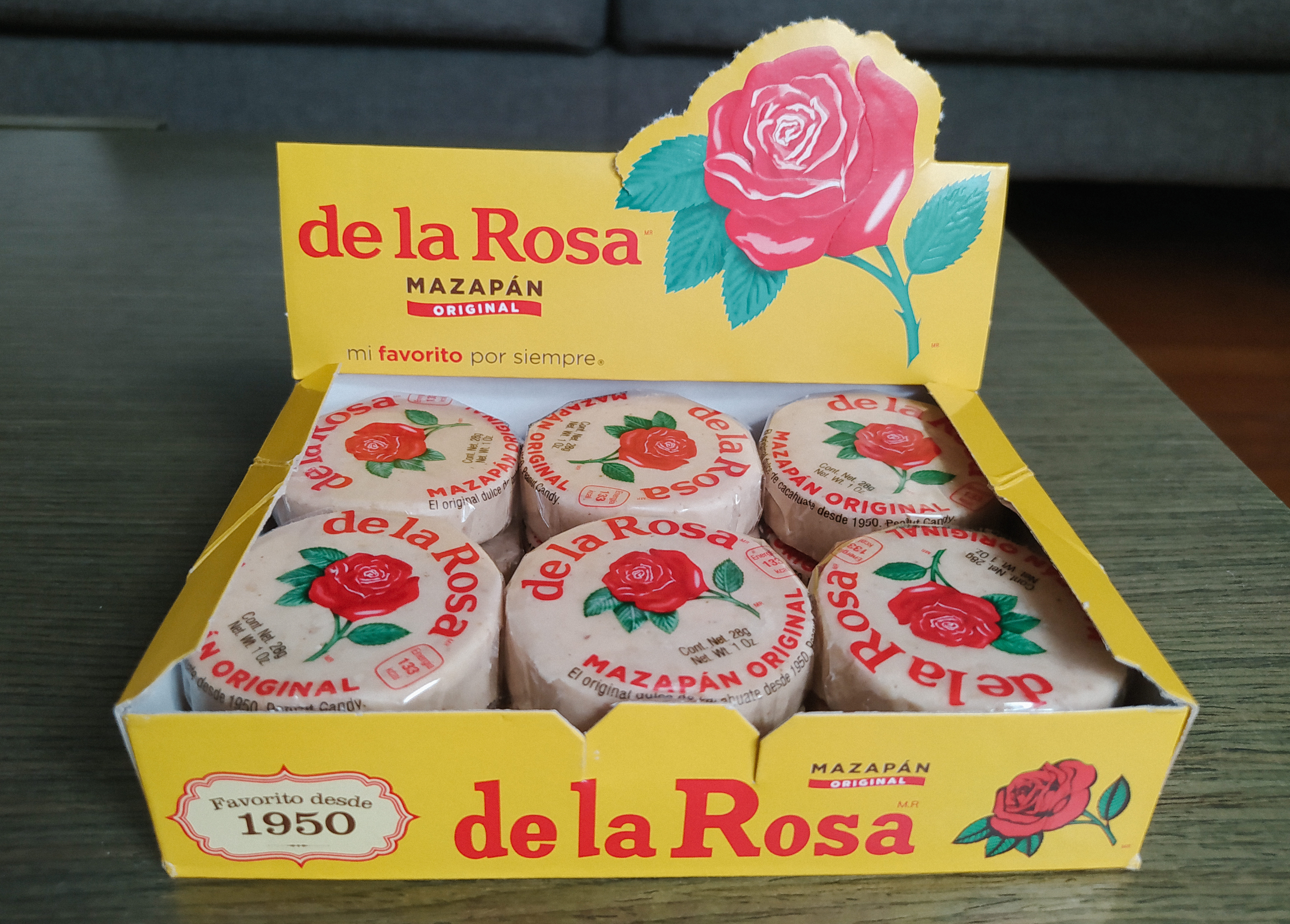 Caja de Mazapán de la Rosa, un clásico mexicano...